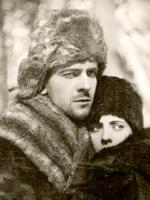 Кадр из польского фильма "В Сибирь" (1930).